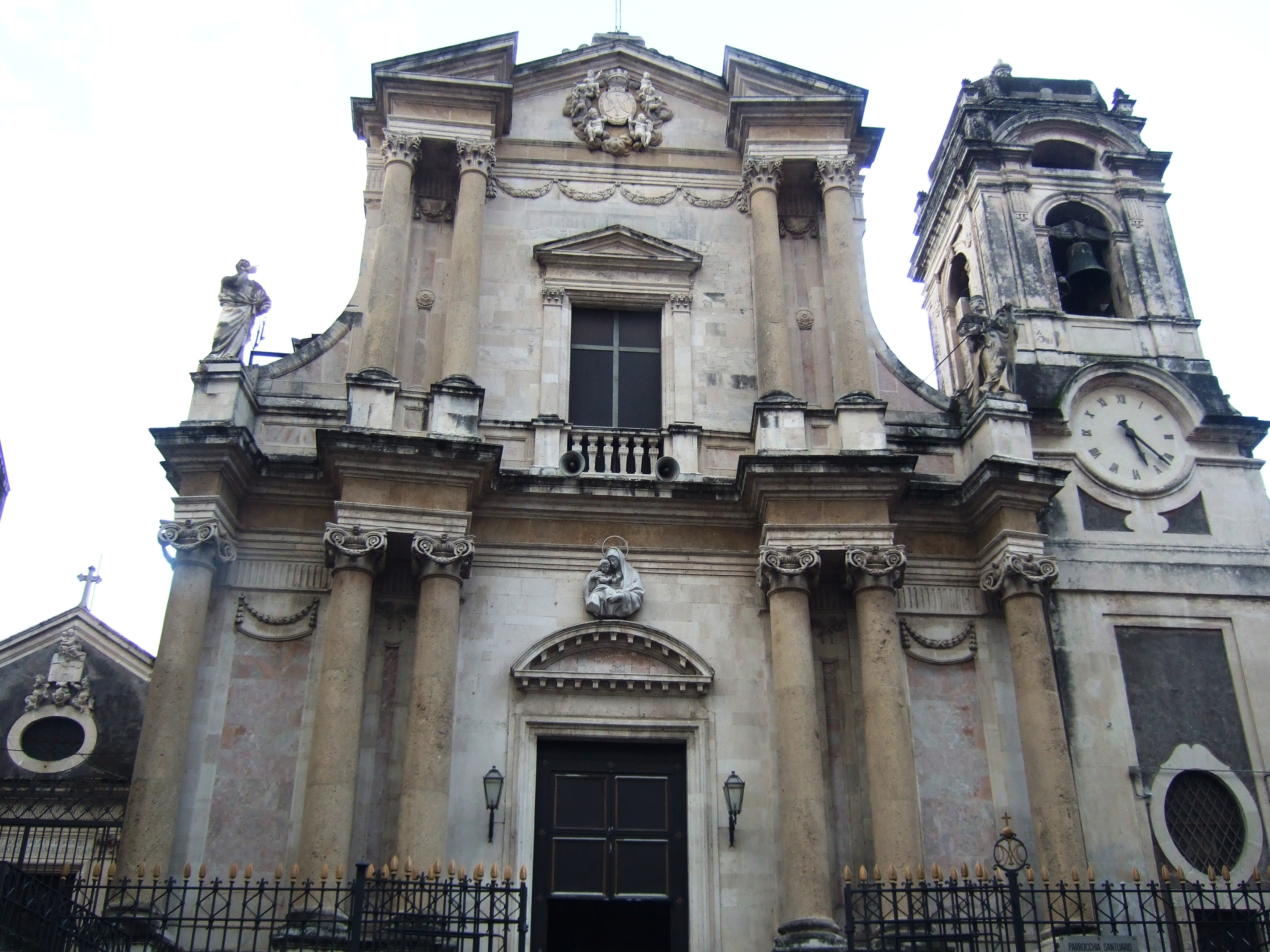 particolare della facciata della Chiesa di Santa Maria dell'aiuto (Catania, XVIII sec.) - A. Battaglia e Michele Orlando